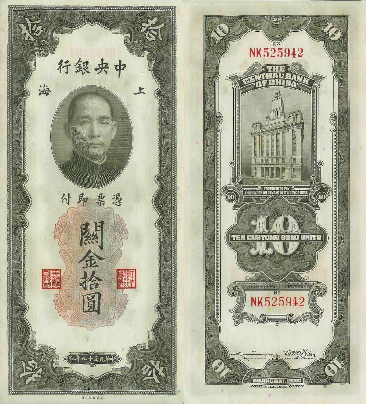 10 CGU bill